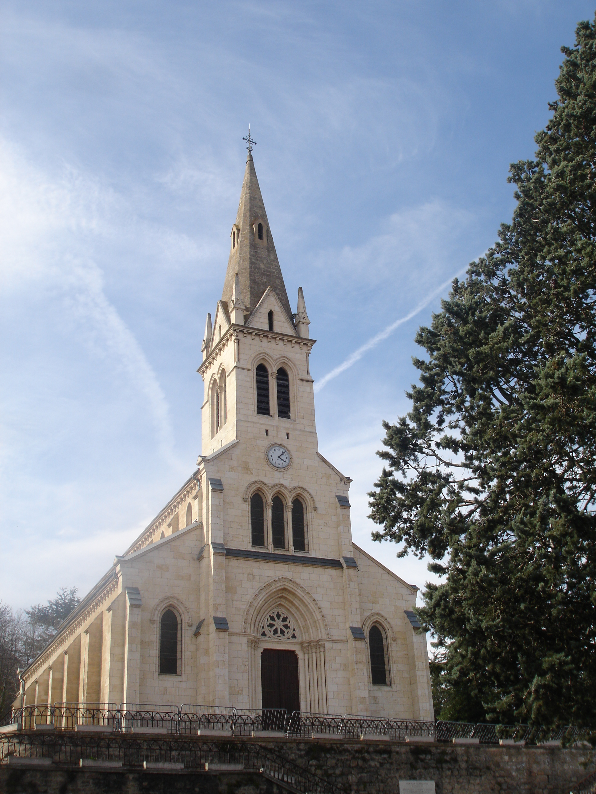 Vernaison (69) : L'église Saint-Denis.